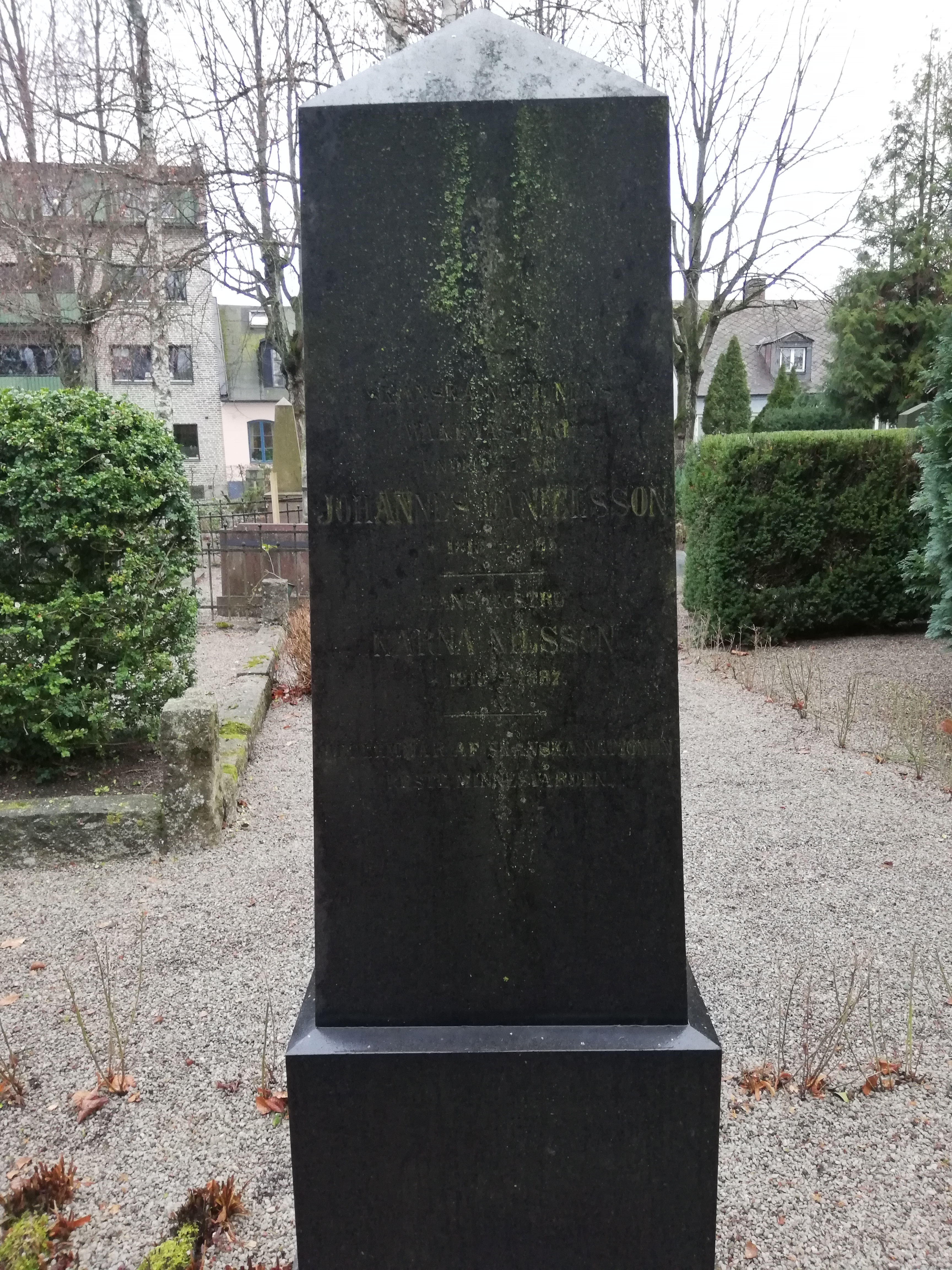 Skånska nationens vaktmästare Johannes Danielssons grav på Östra kyrkogården i Lund.